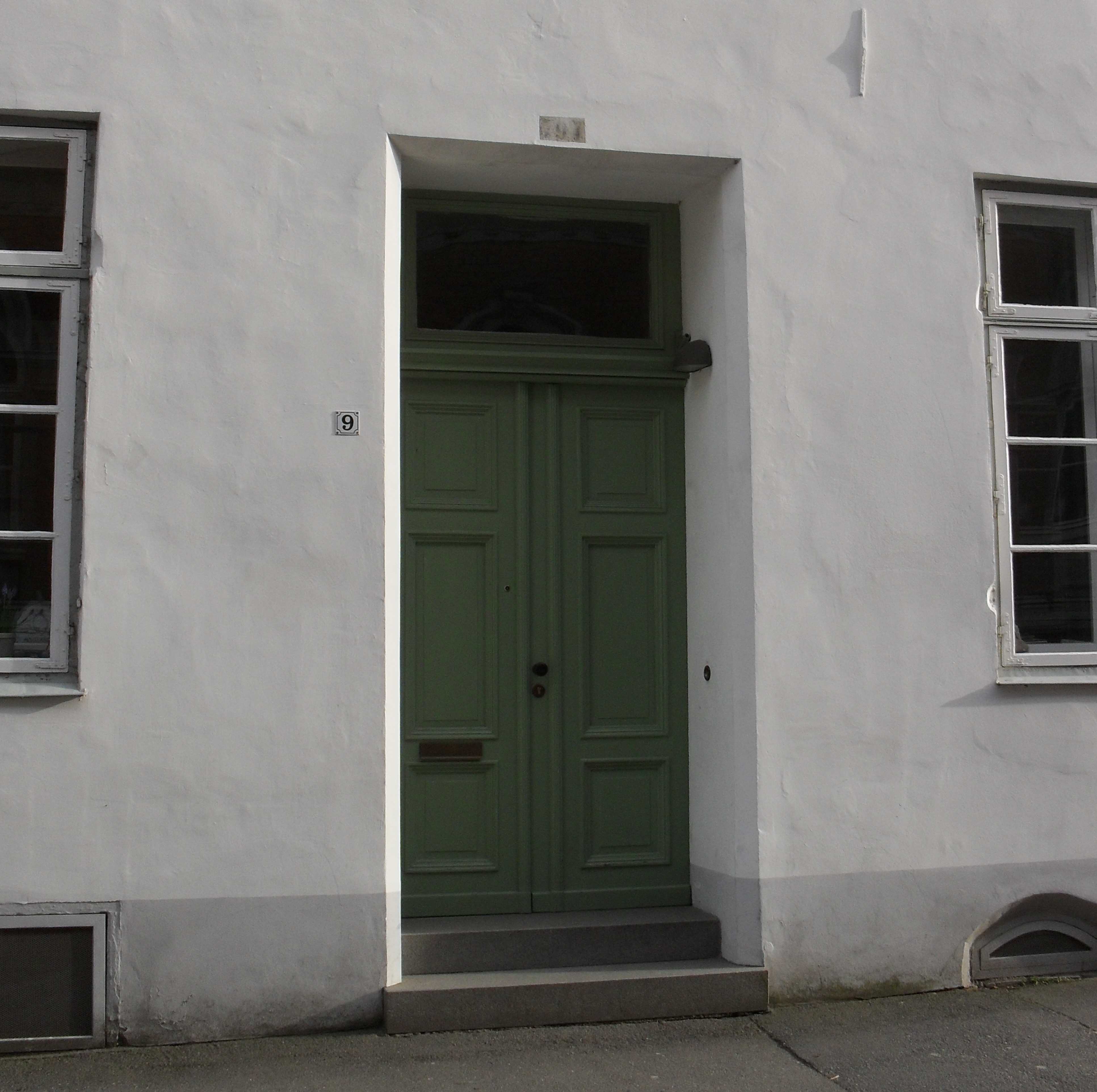 Eingang des Hauses St.-Annen-Straße 9 in Lübeck mit originaler alter Hausnummer von 1820 (No. 797) über der Tür